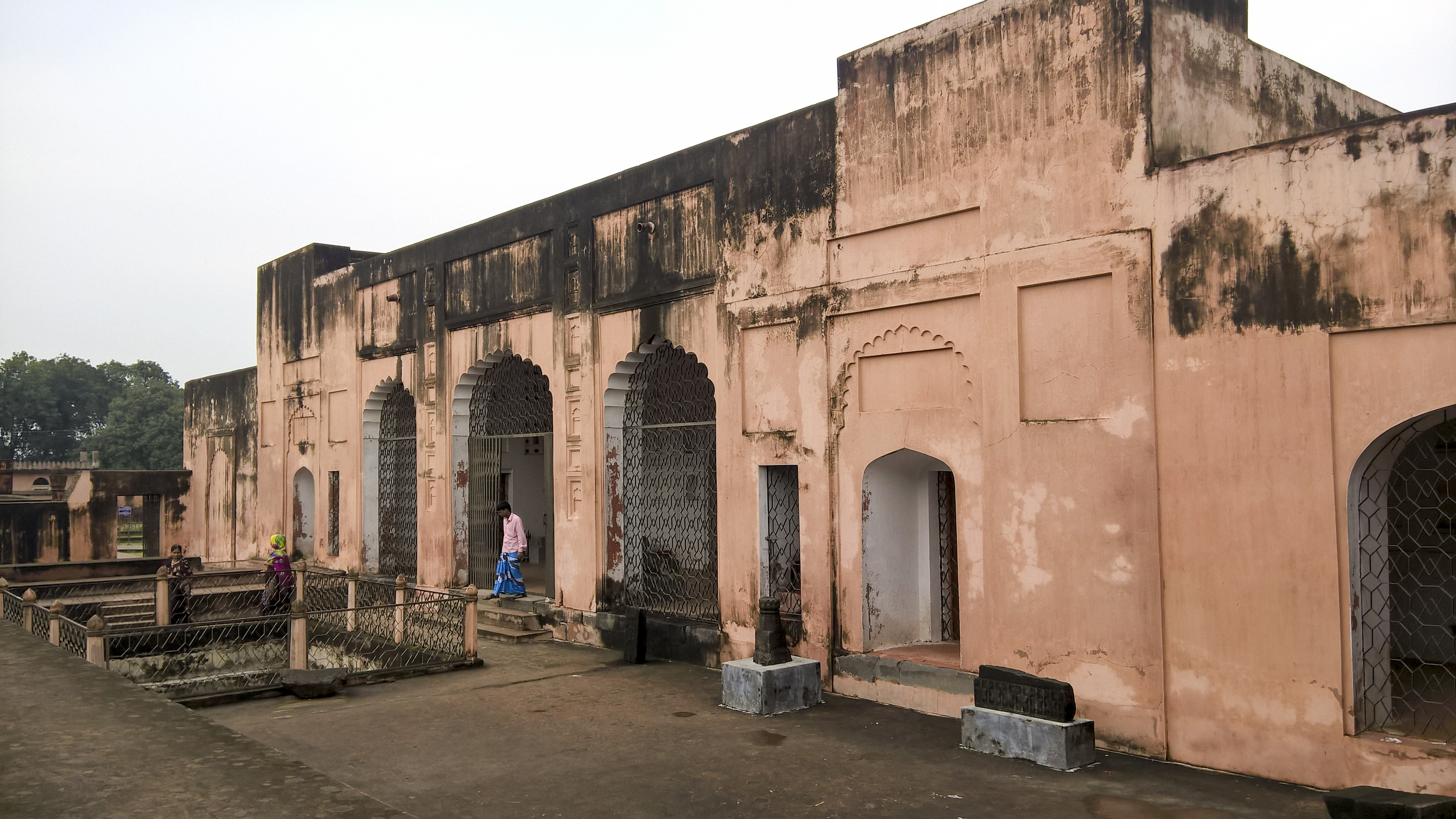 শাহ সুজার তাহখানা একটি তিনতলা বিশিষ্ট রাজ প্রাসাদ। গৌড়-লখনৌতির ফিরোজপুর এলাকায় একটি বড় পুকুরের পশ্চিম পাড়ে অবস্থিত ভবন কাঠামোটি ঐতিহ্যগতভাবে তোহাখানা নামে পরিচিত। চাঁপাইনবাবগঞ্জ থেকে প্রায় ৩৫ কি.মি. দূরেুত্বে অবস্থিত শিবগঞ্জ উপজেলার শাহাবাজপুর ইউনিয়নে ঐতিহ্যবাহী তোহাখানা কমপ্লেক্স বা তোহাখানা অবস্থিত।